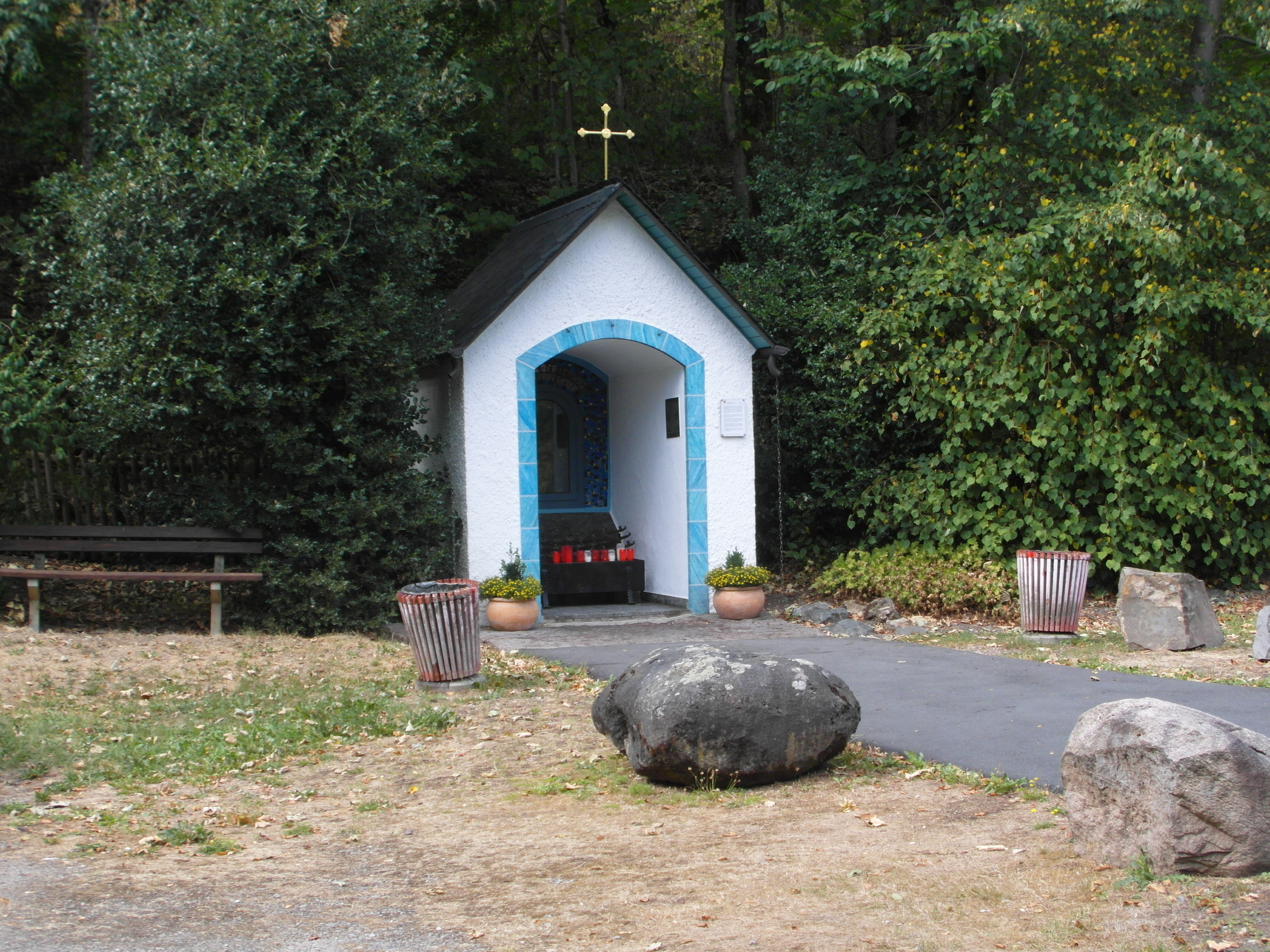 Bildstock Madonna der Stzraße nahe Oedingen (Baujahr ca 1880